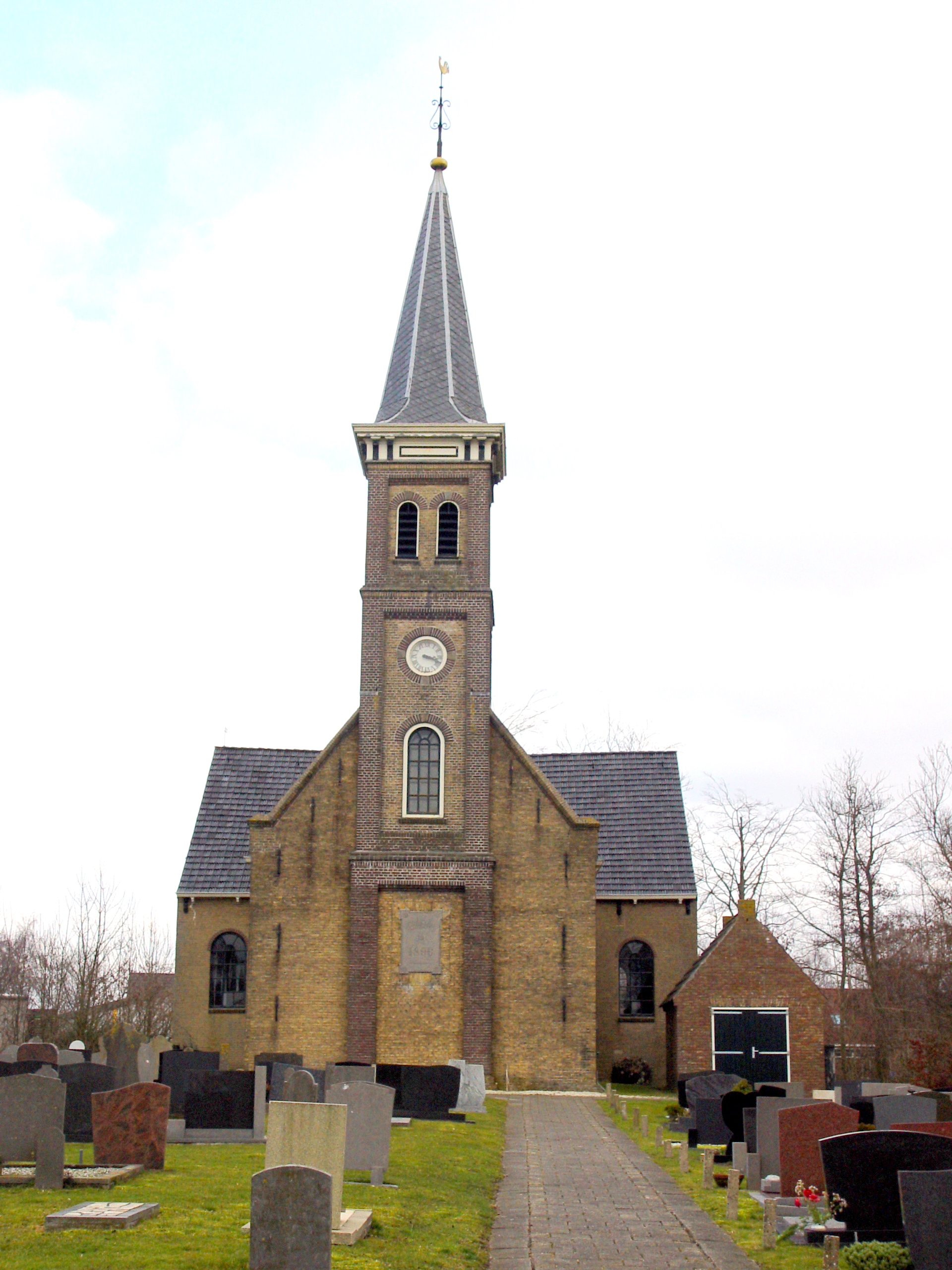 RK - kerk te Hemelum gemeente Súdwest-Fryslân